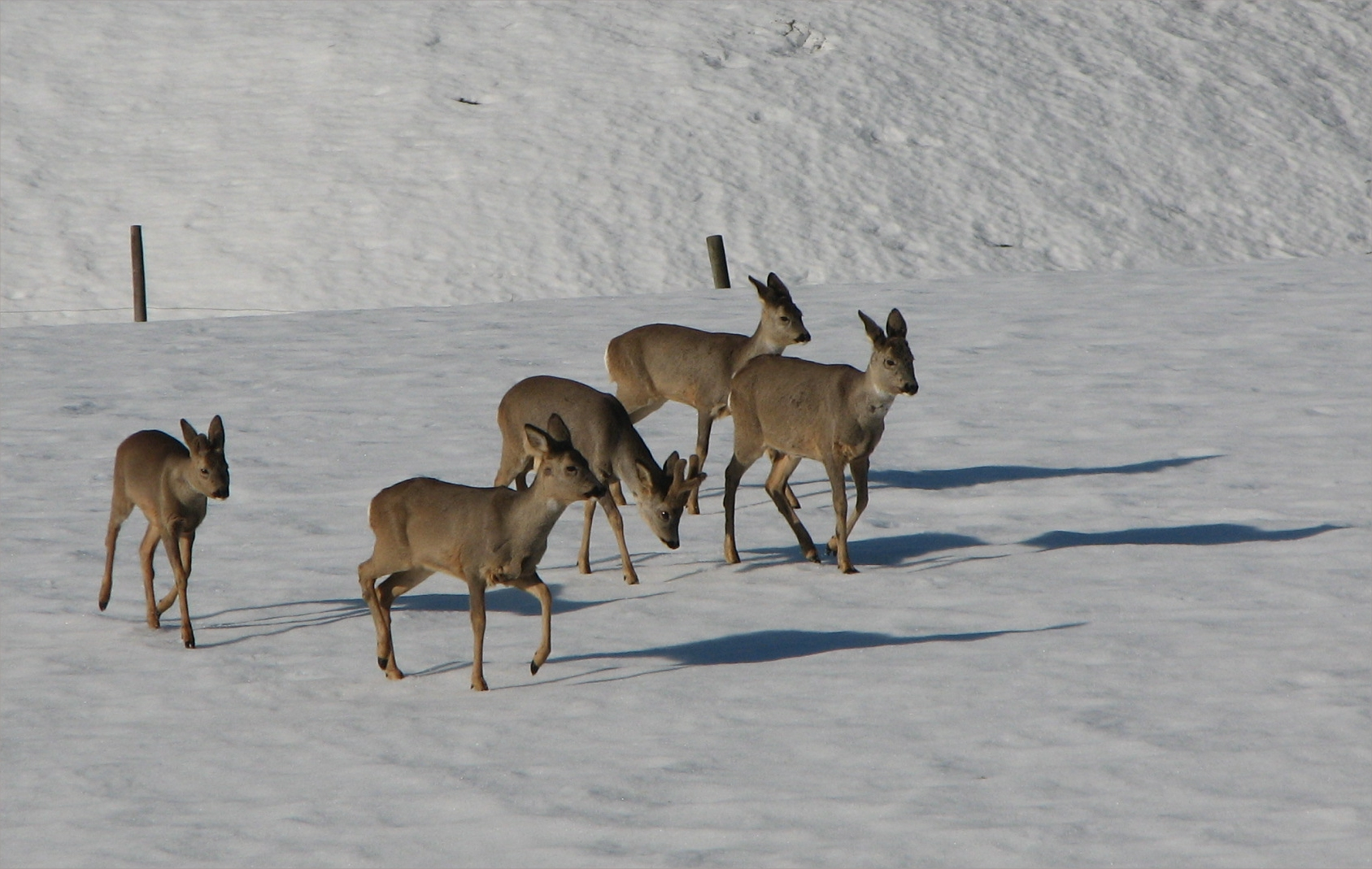 Rådyrflokk på skaren